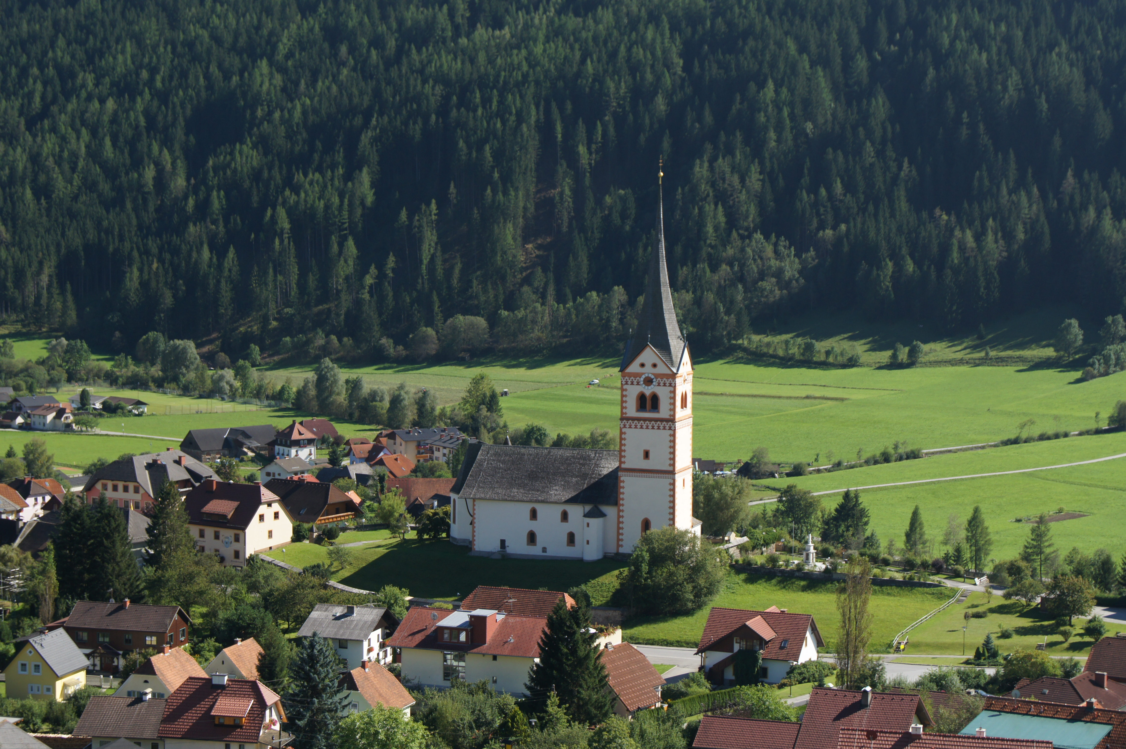 Kath. Pfarrkirche hl. Petrus